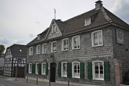 Eines der schönesten und ältesten Gebäude von Brück.